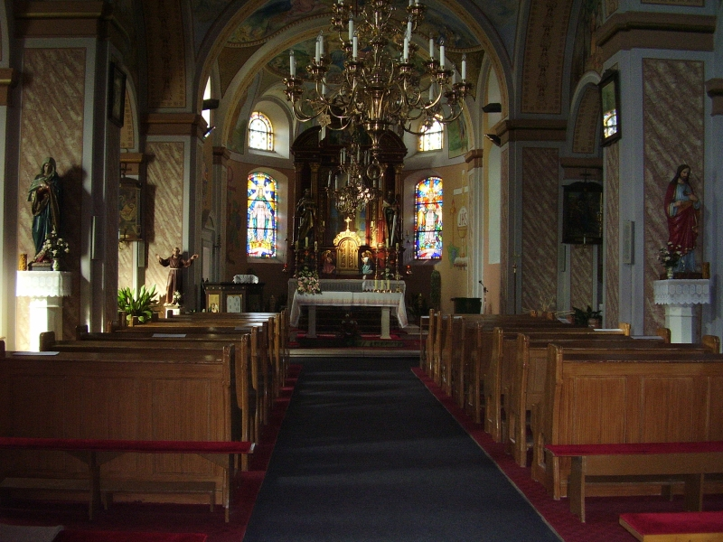 Unutrašnjost Crkve svete Terezije Avilske u Ravnoj Gori